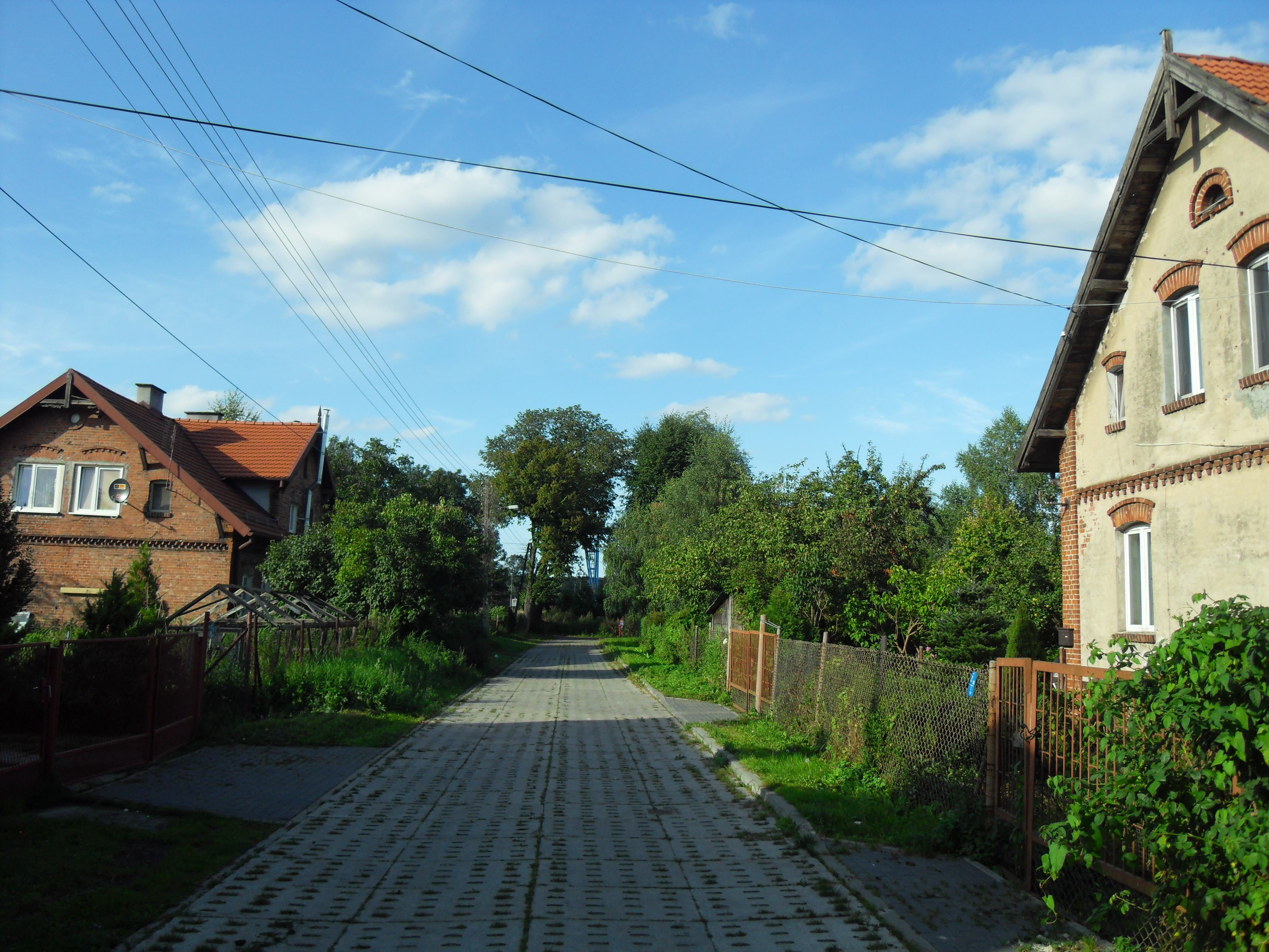 Gdańsk Płonia Wielka, ul. Zagroble.